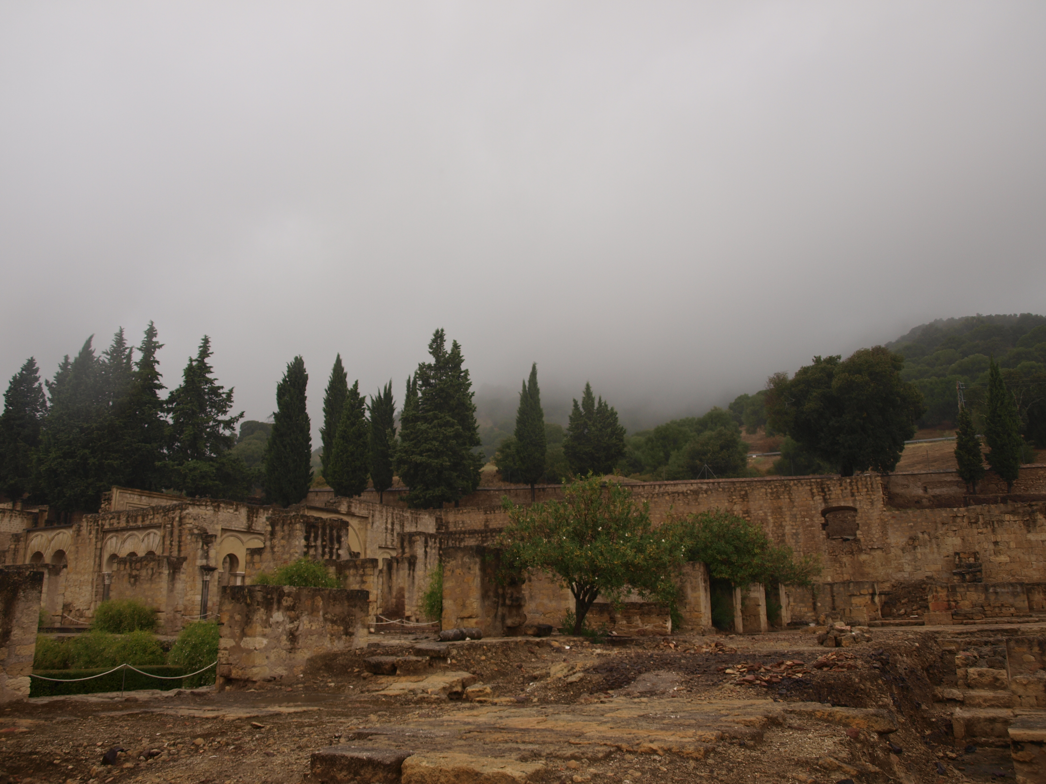 Medina Azahara en Córdoba (España).